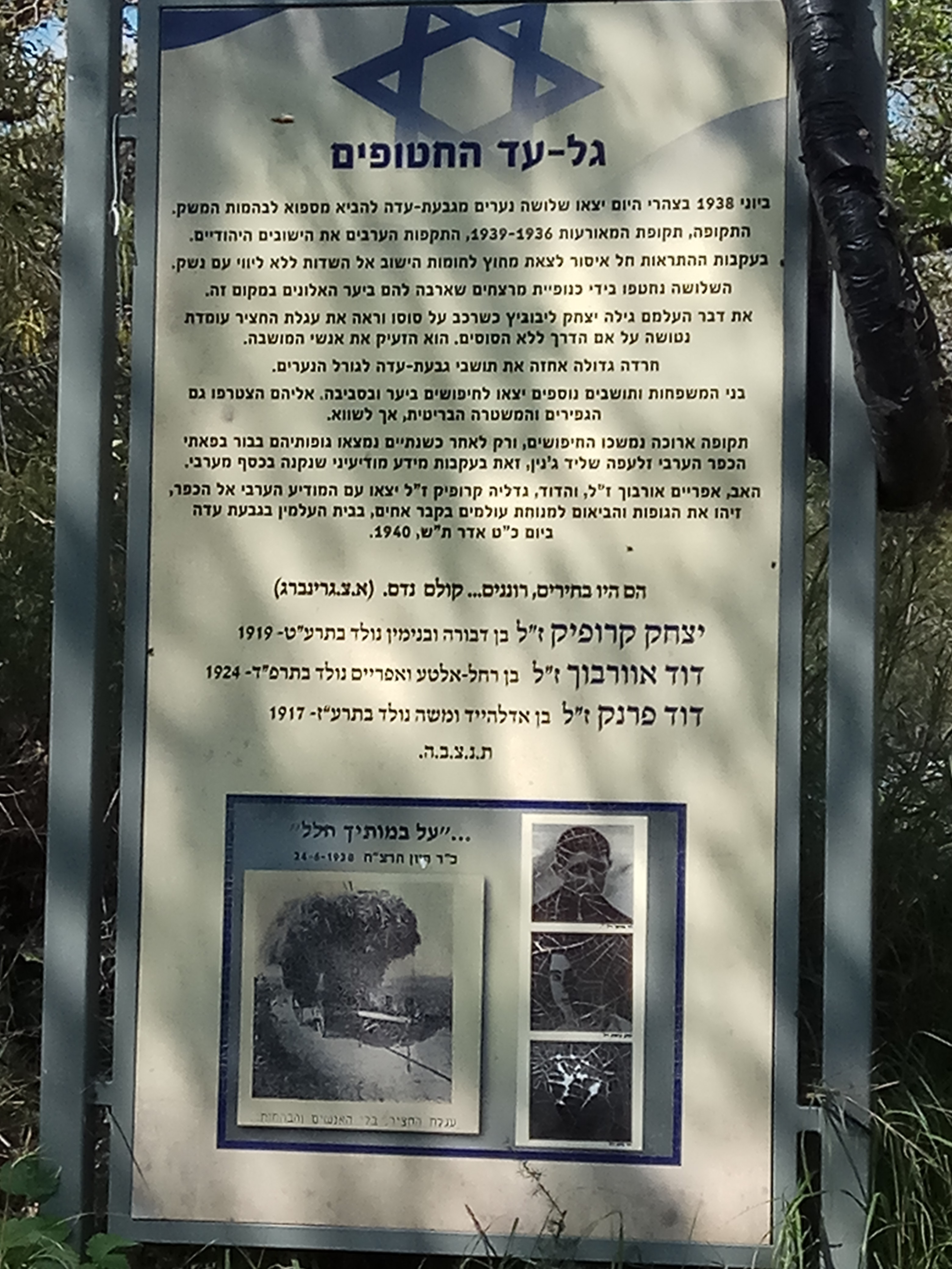 שלט הנצחה בשמורת אלוני יצחק לשלושת הנרצחים מגבעת עדה ב-1938